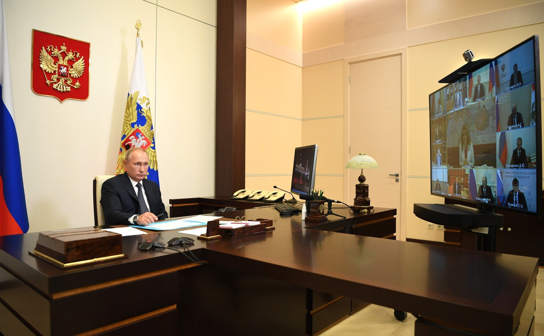 Совещание Президента России В. Путина, на котором было объявлено о первой в мире регистрации вакцины против коронавирусной инфекции COVID-19.